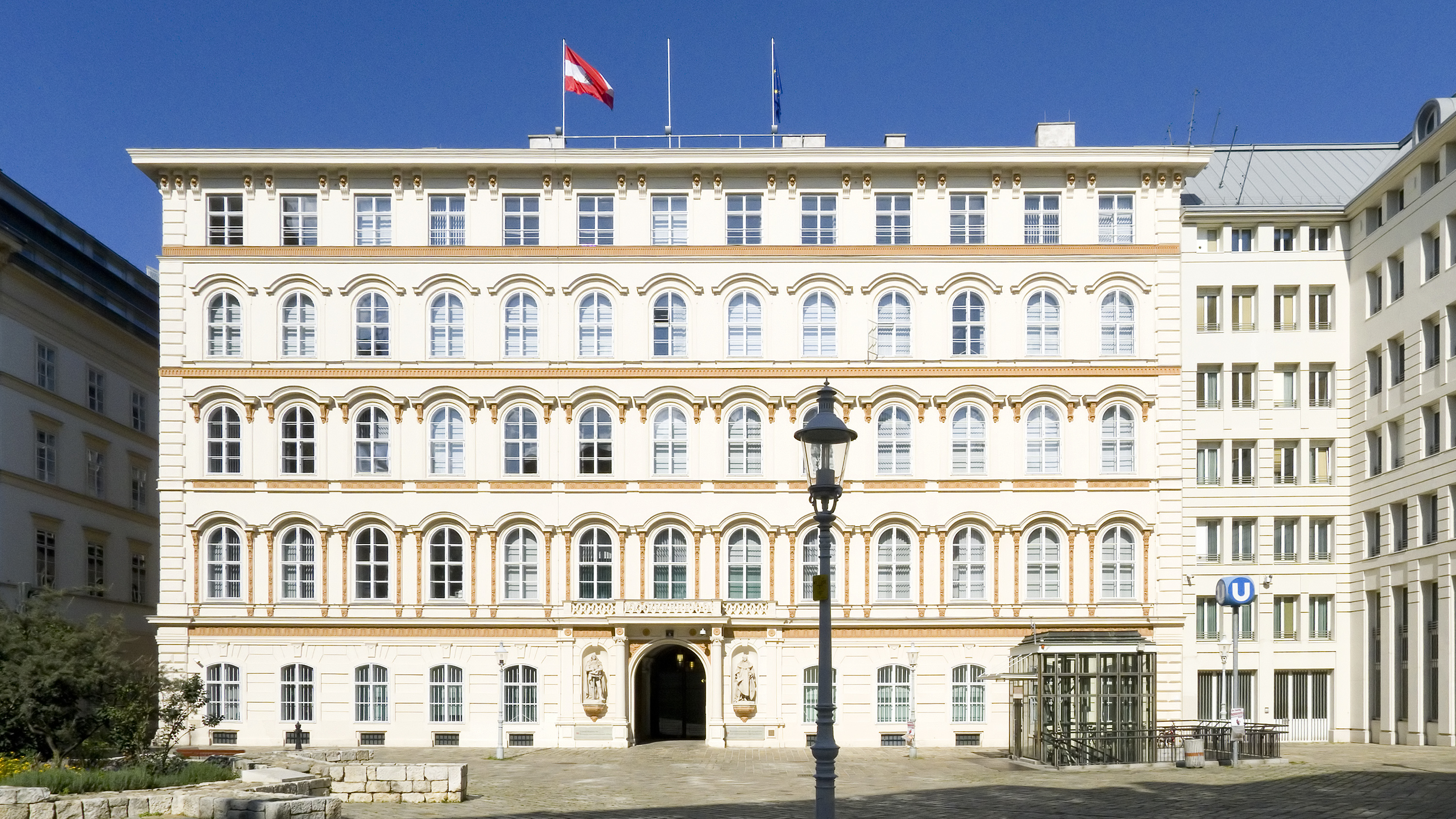 Bundesministerium für europäische und internationale Angelegenheiten in Wien 1, Minoritenplatz